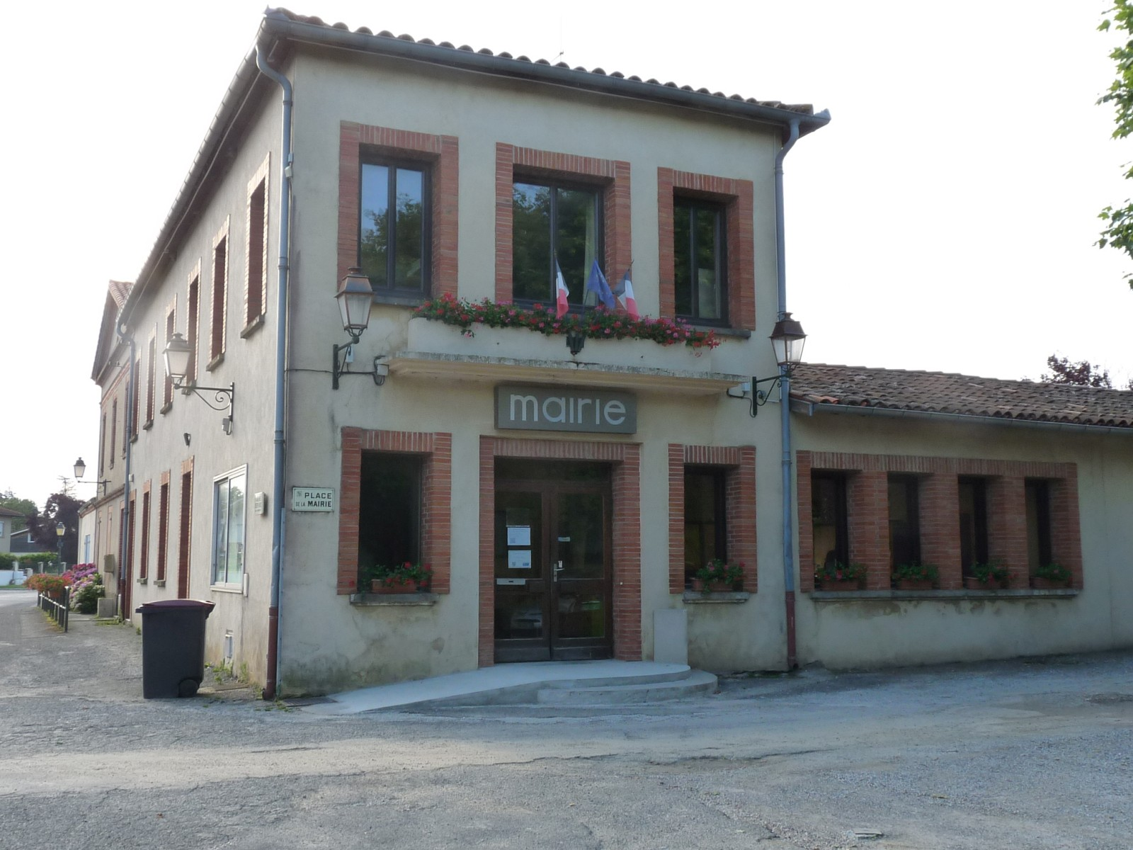 Mairie de Sainte-Foy-d'Aigrefeuille, Haute-Garonne, France